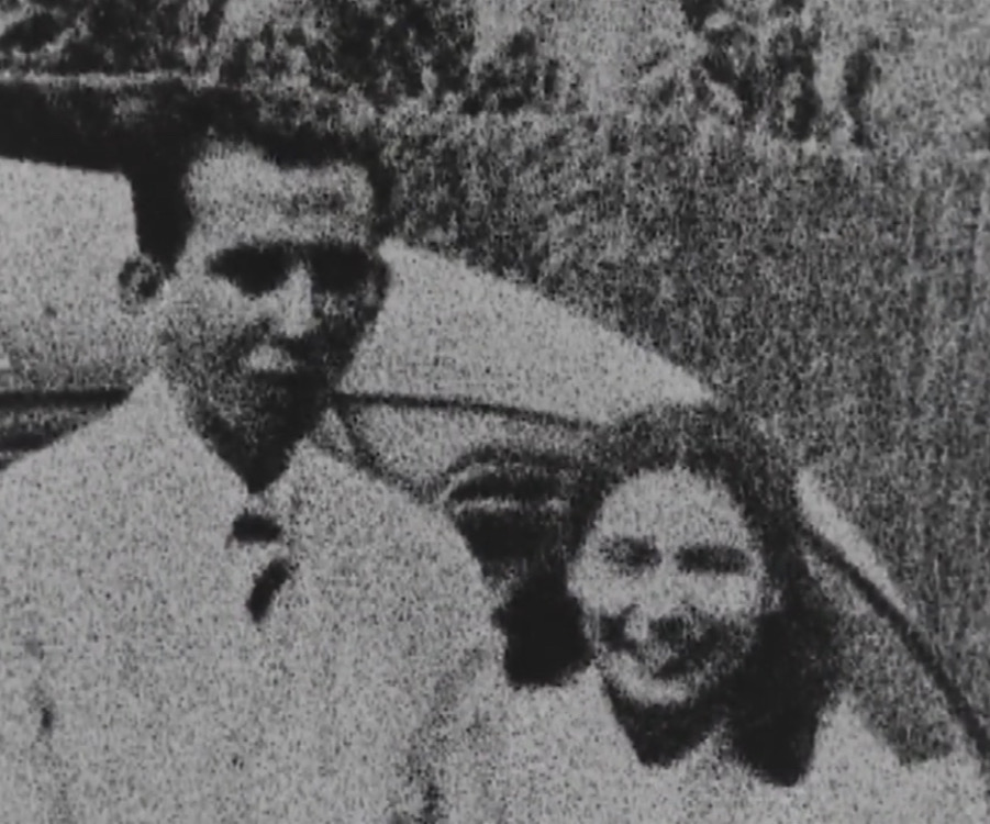 Carlos Andrés Pérez y Blanca Rodríguez durante su juventud.